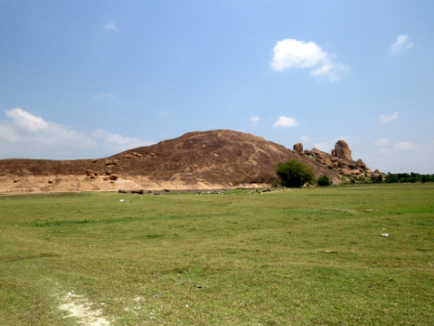 அரிட்டாப்பட்டி மலை